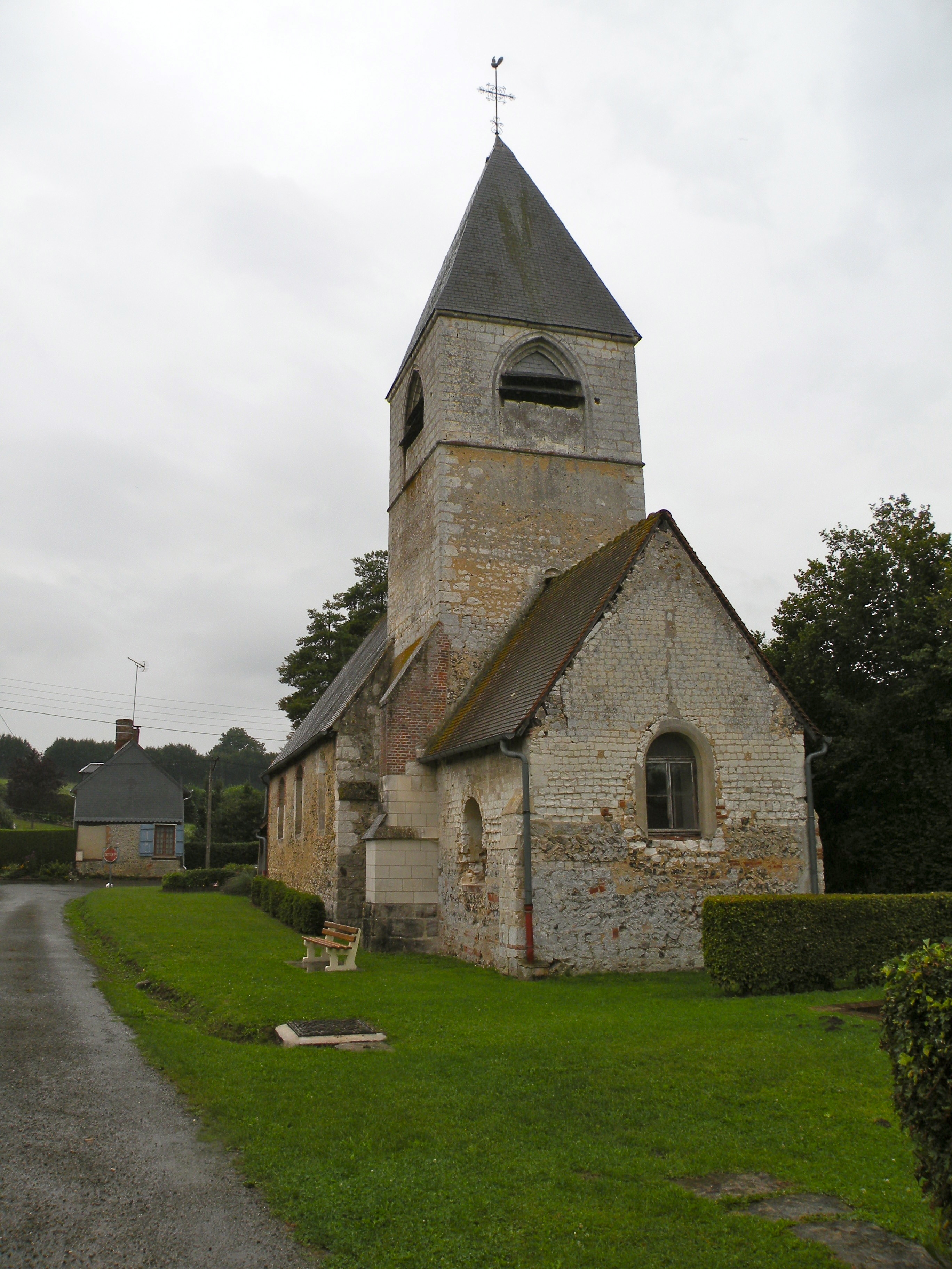 Église Notre-Dame de Lachapelle-sous-Gerberoy